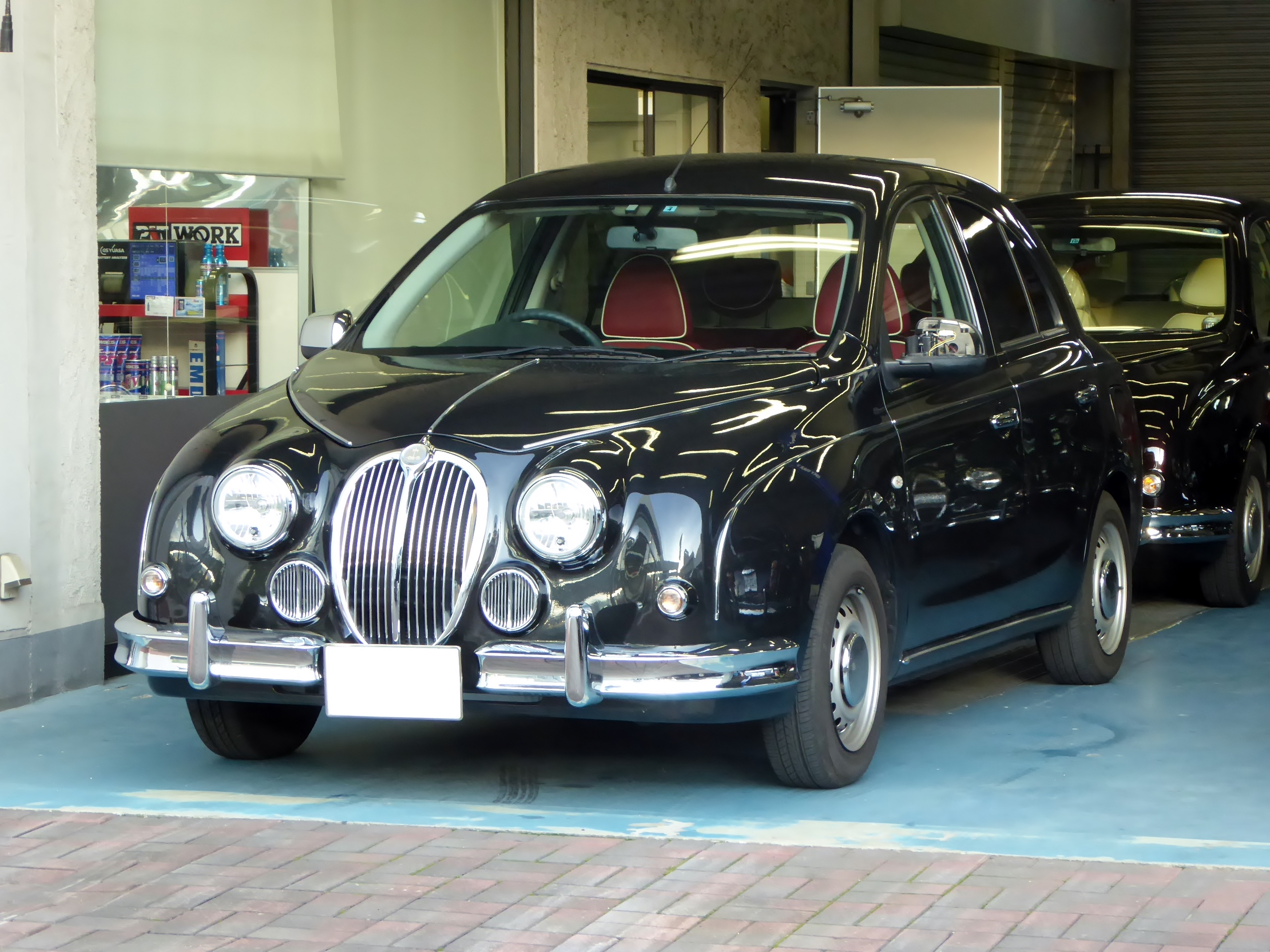 K13型光岡・ビュート12STをフロントから撮影。